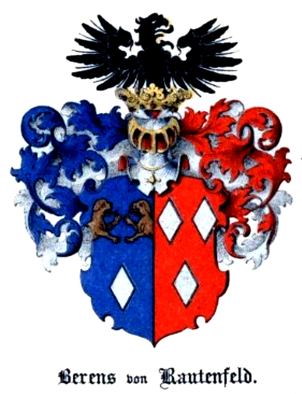 Wappen derer Berens von Rautenfeld